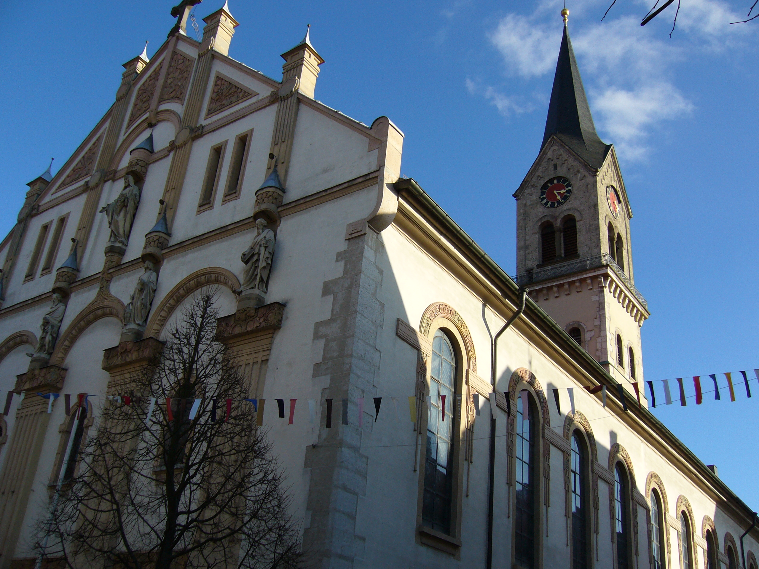 Evangelische Stadtkirche in Tuttlingen, Jugendstilfassade aus dem frühen 20. Jahrhundert